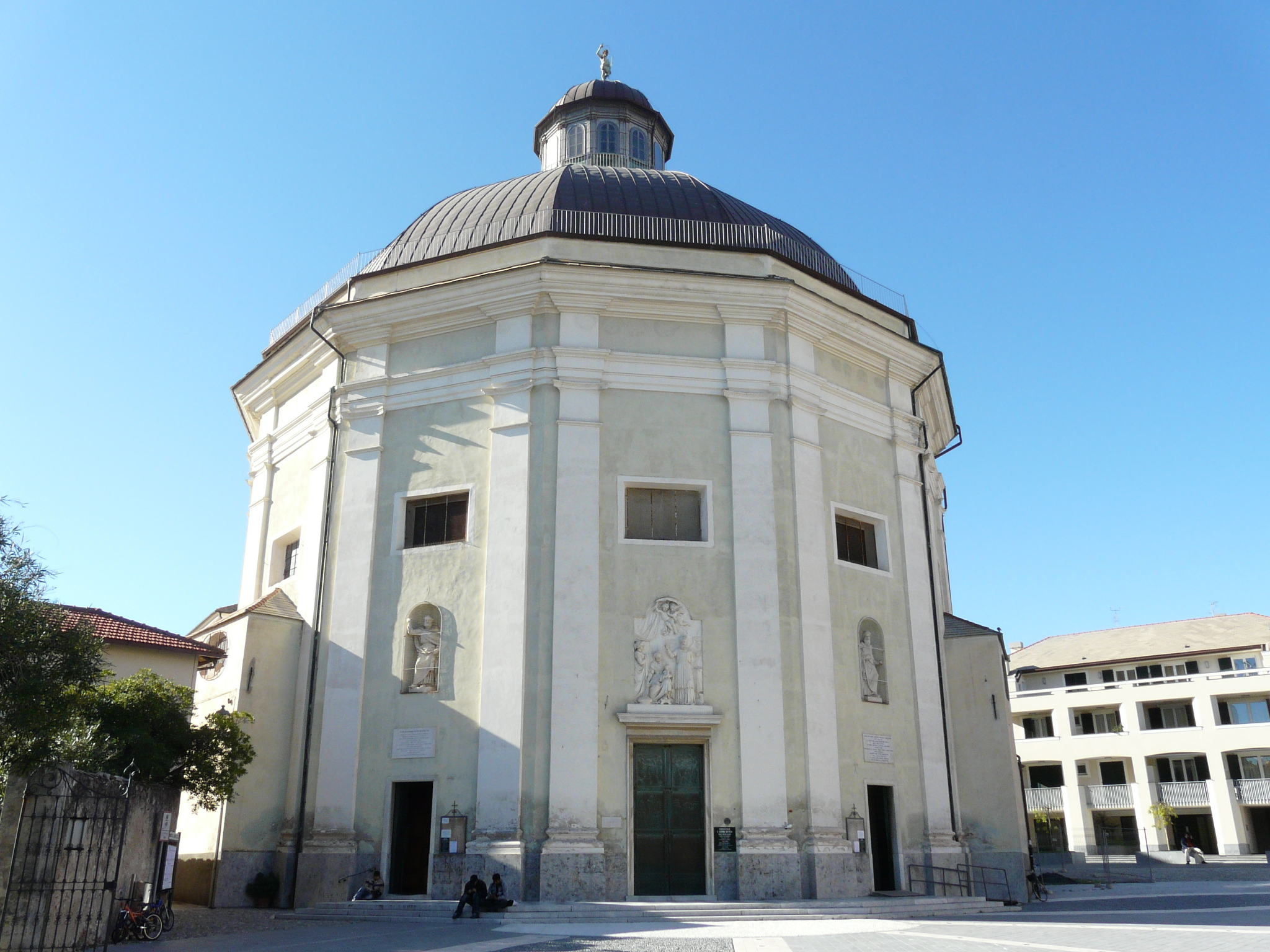 Duomo di San Giovanni Battista, Loano, Liguria, Italia.